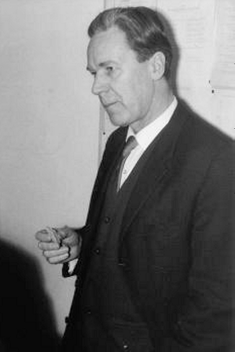 Paul Lorenzen 1967 in Erlangen